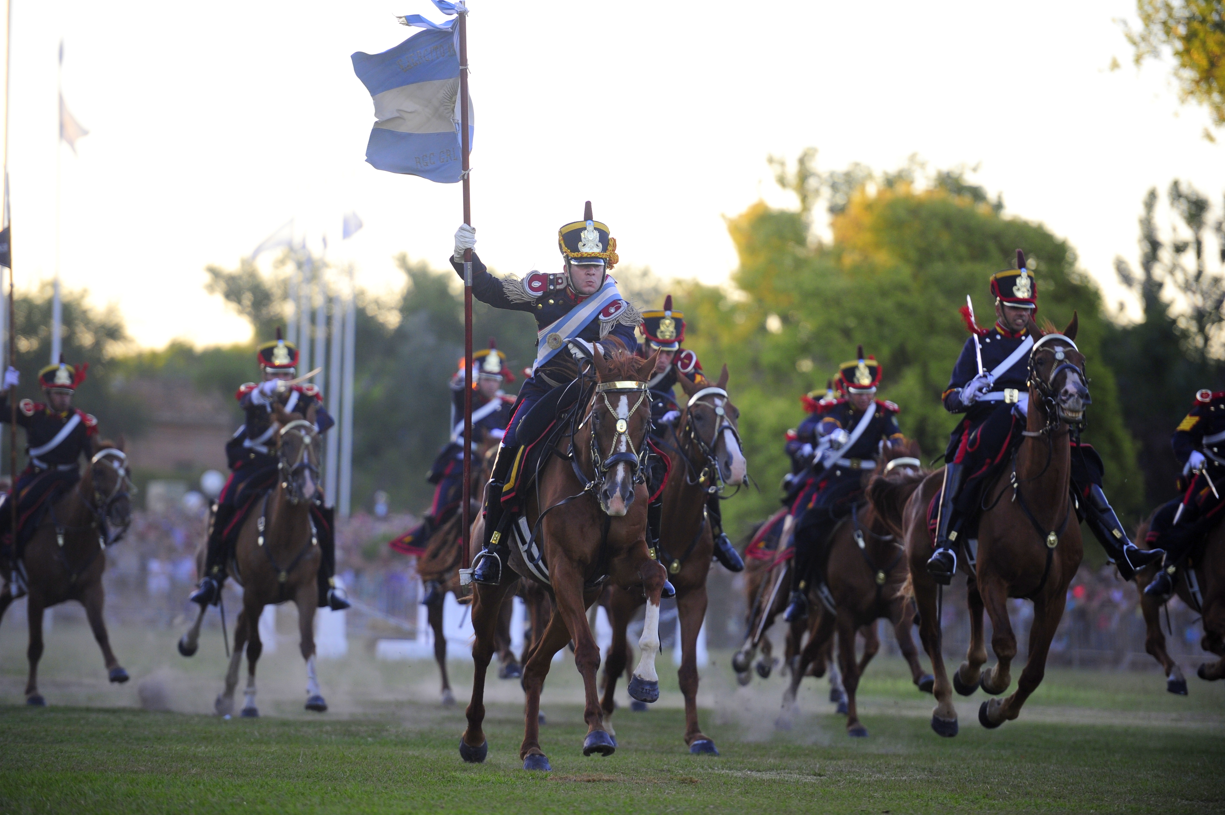 Carga de Caballeria del Regimiento de Granaderos a Caballos, durante los festejos por el Bicentenario de la Batalla de San Lorenzo